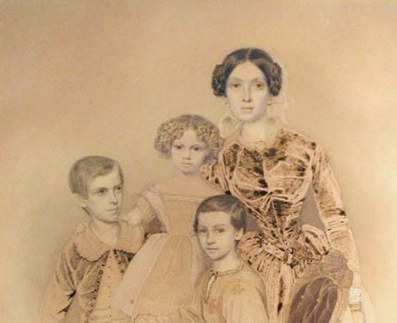 Княгиня Екатерина Петровна Урусова (1817—1902; ур. Энгельгарт) и дети её Александр, Федор и Зинаида.